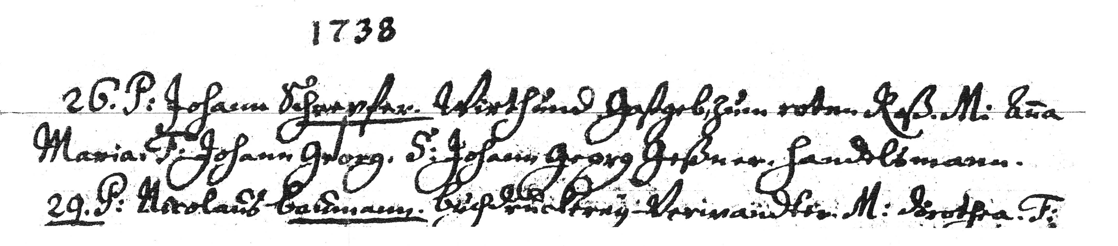 Taufbucheintrag Johann Georg Schrepfer, Nürnberg